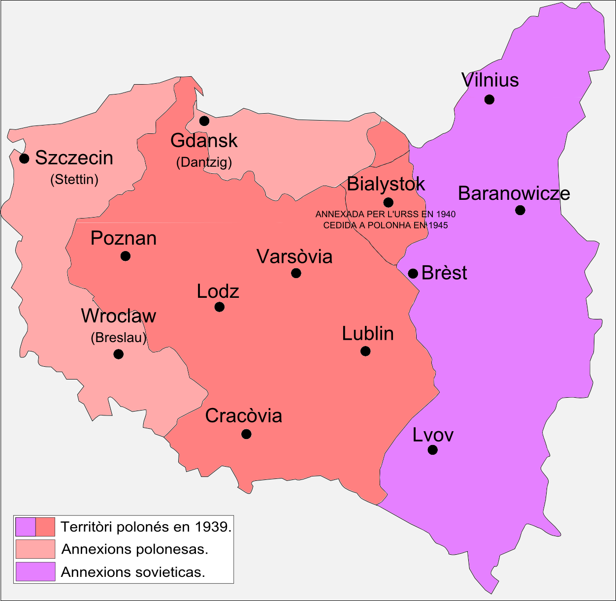 Cambiaments territòriaus de Polonha en 1945.